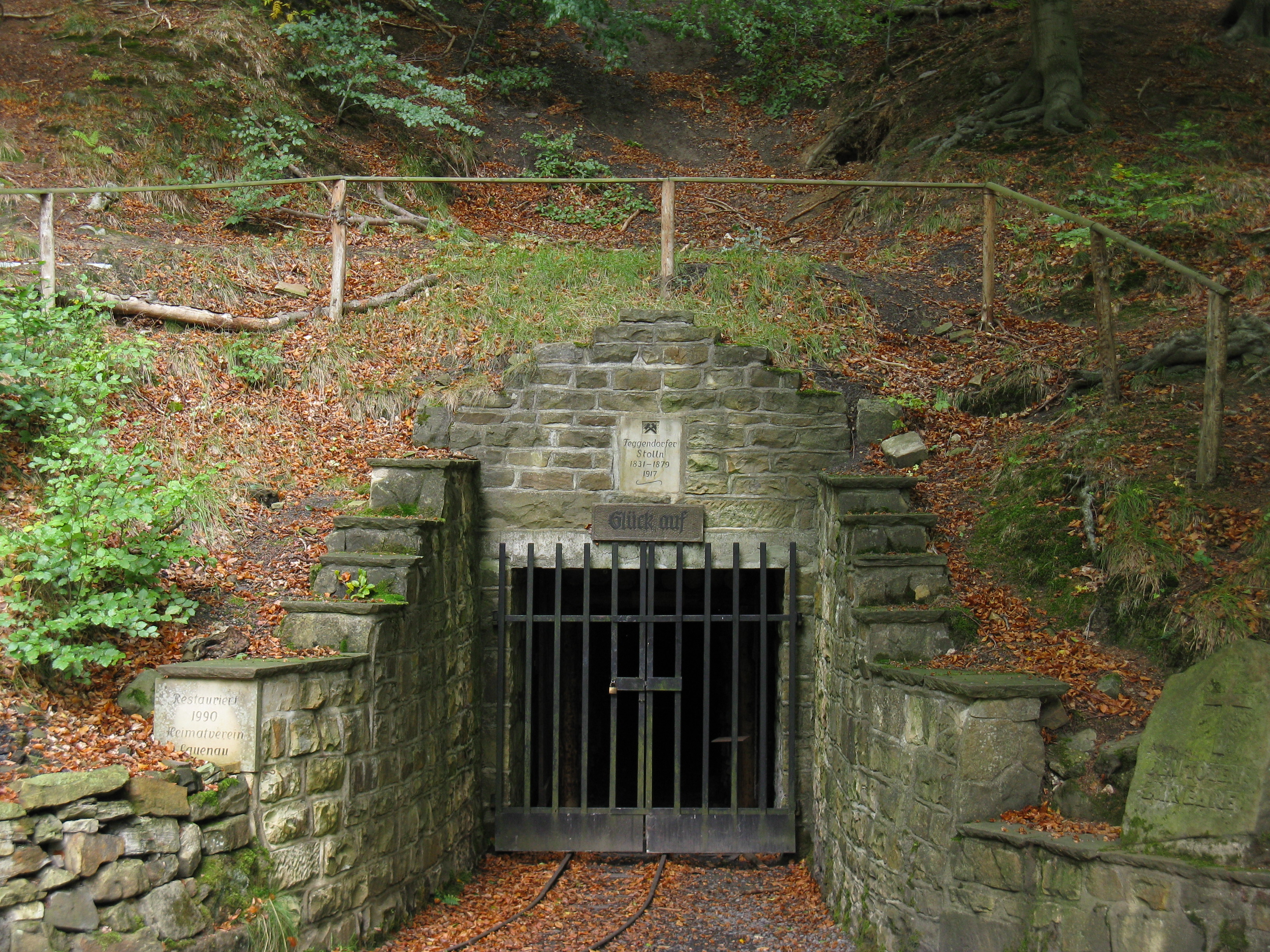 Feggendorfer Stolln: Stollen-Mundloch (Blick von außen)